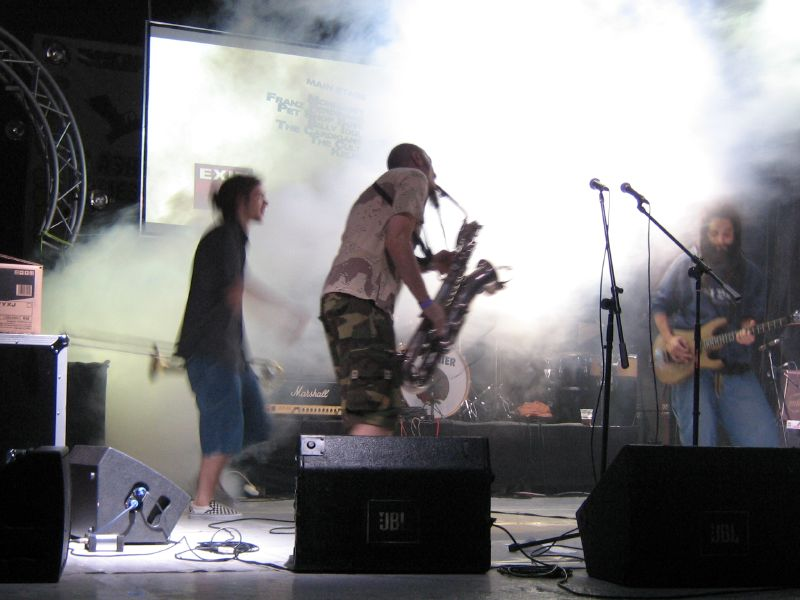 Eyesburn